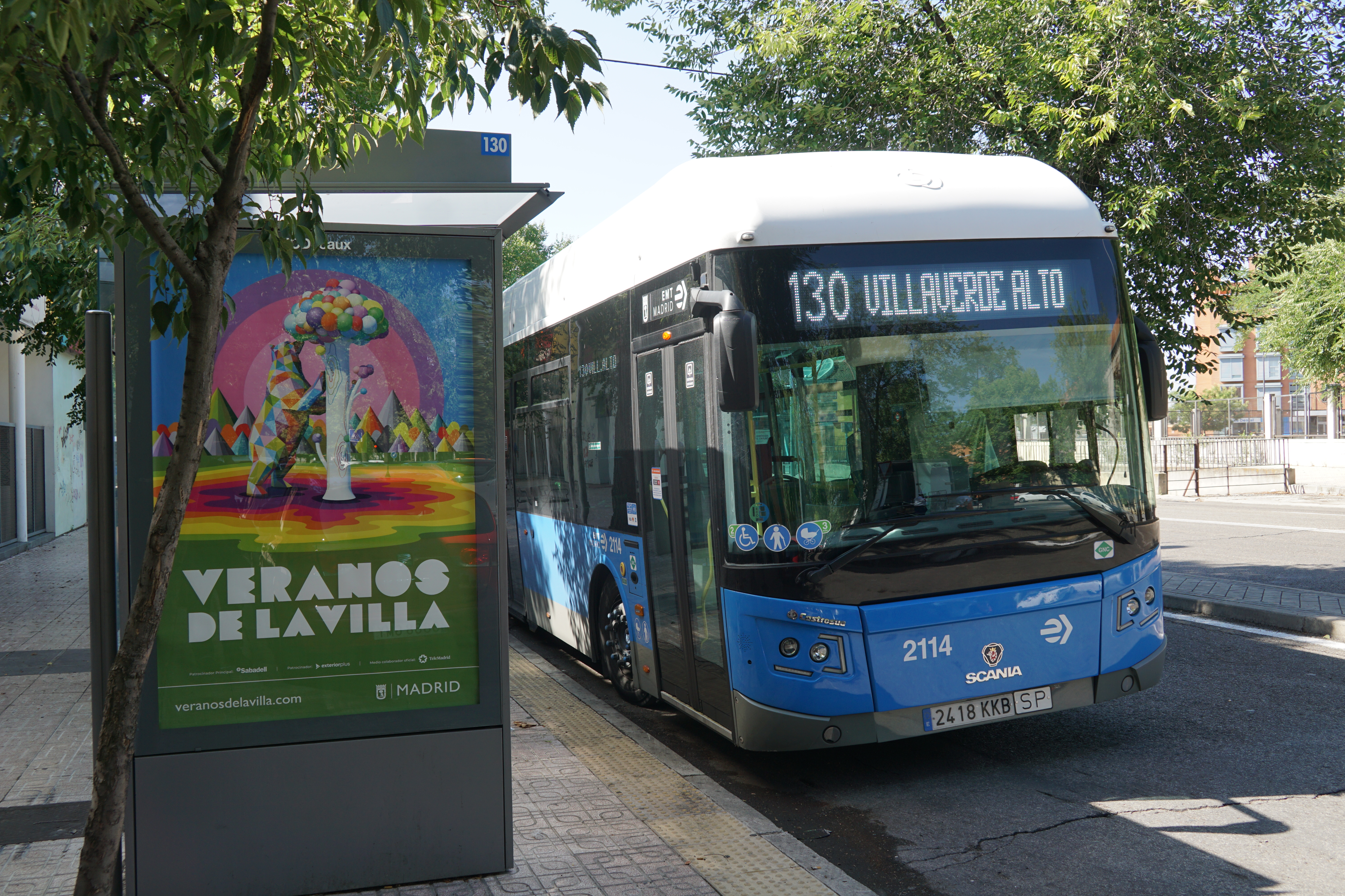 Final de la línea 130 en Vicálvaro, agosto 2020